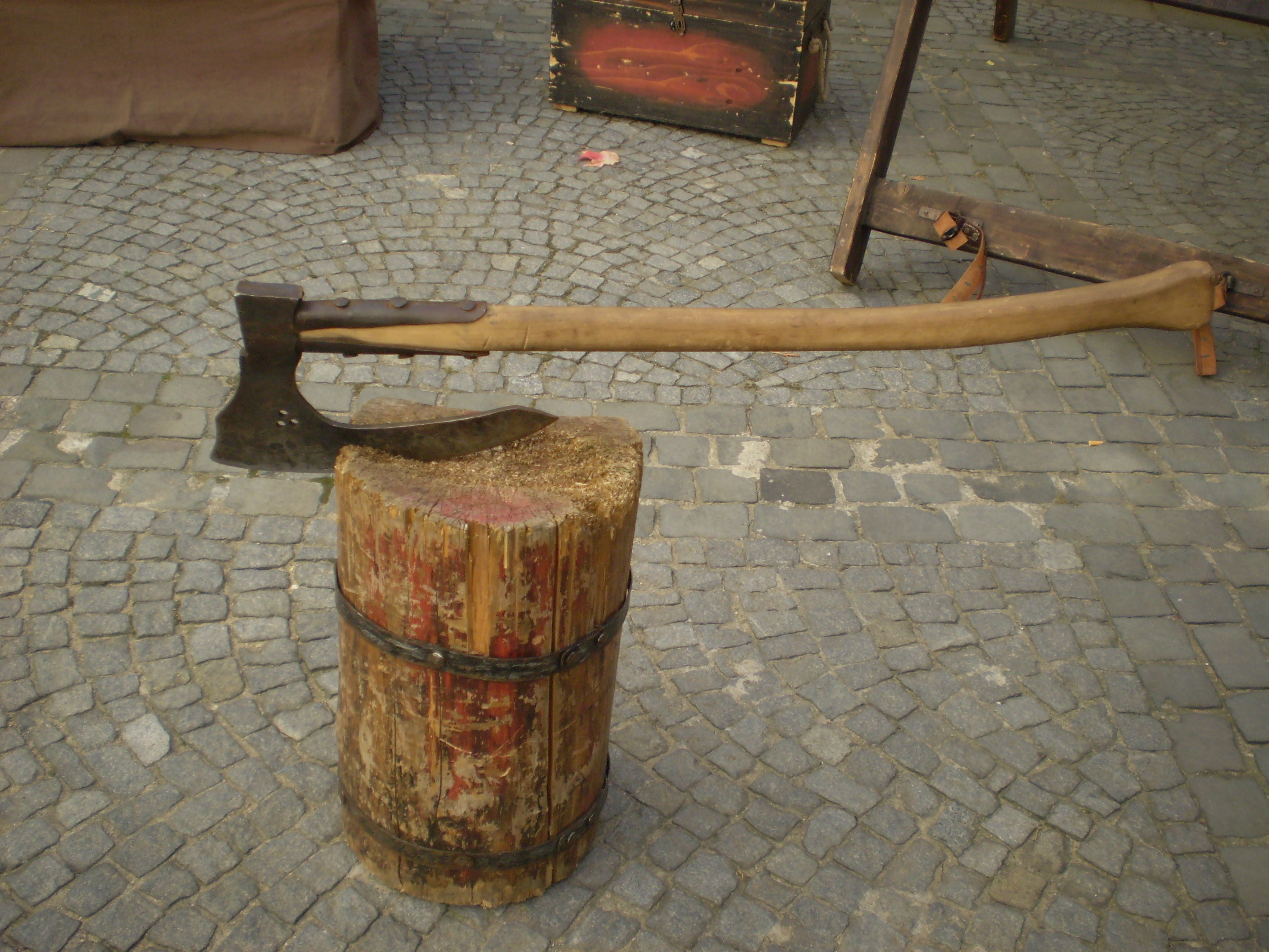 Katova sekera na zámku Mikulov.